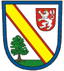 Znak obce Peruc